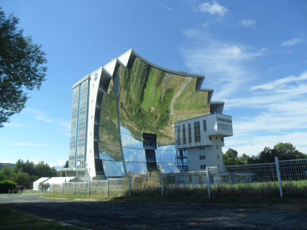 Le four solaire d'Odeillo concentre les rayons du Soleil et peut atteindre plus de 3 500 °C. Aucun matériau ne lui résiste, même le diamant fond. Il offre une vision d'un futur où la métallurgie utiliserait l'énergie du Soleil, qui est à la fois propre et renouvelable.